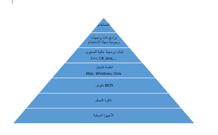 جدول هرمي يوضح طبقات أي حاسوب من الأجزاء الصلبة حتى المستخدم البشري